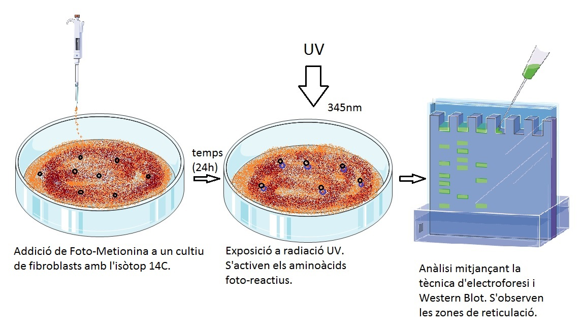 Procés general d'identificació de reticulacions amb aminoàcids anàlegs foto-reactius.